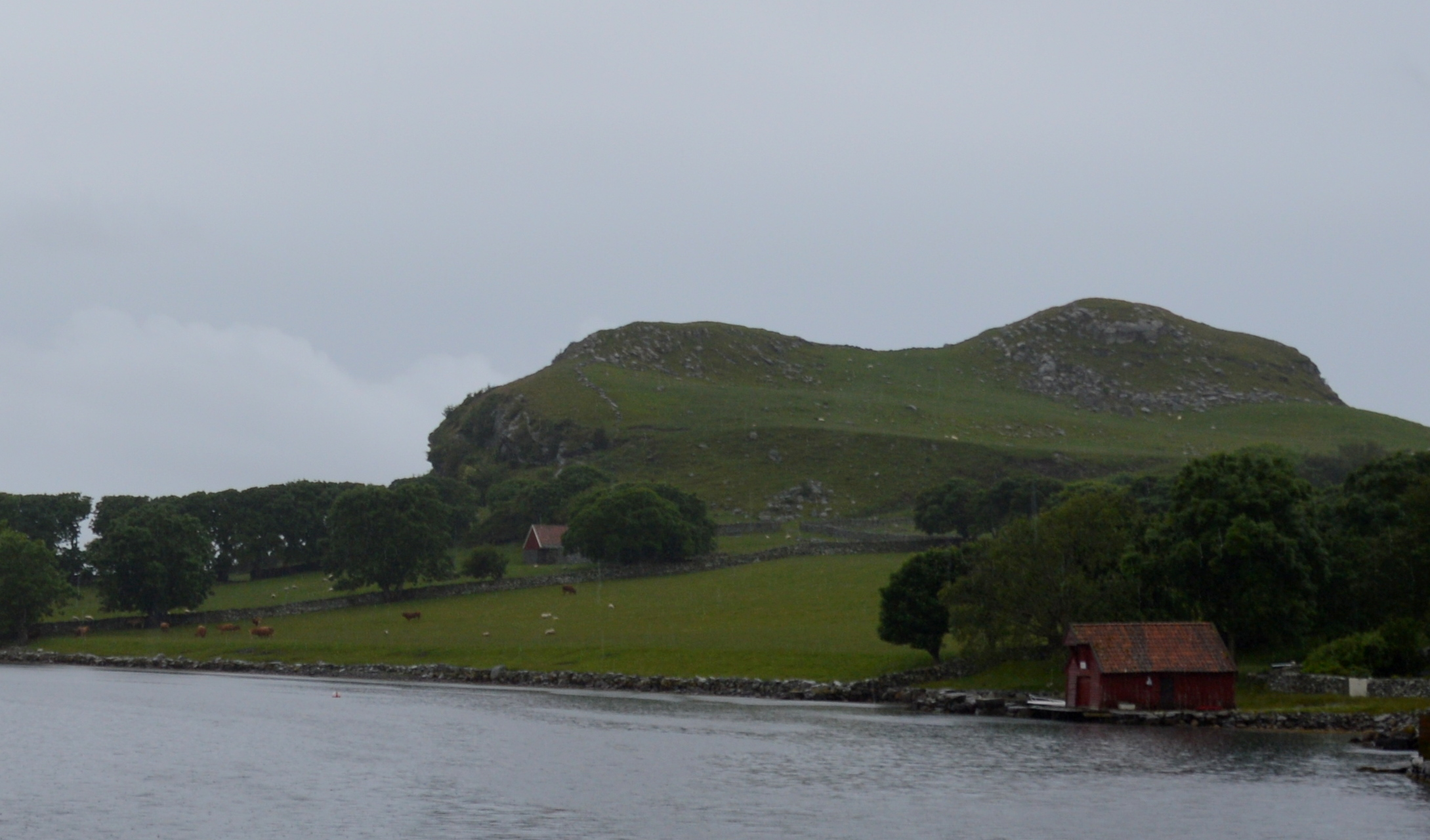 Kneberfjellet